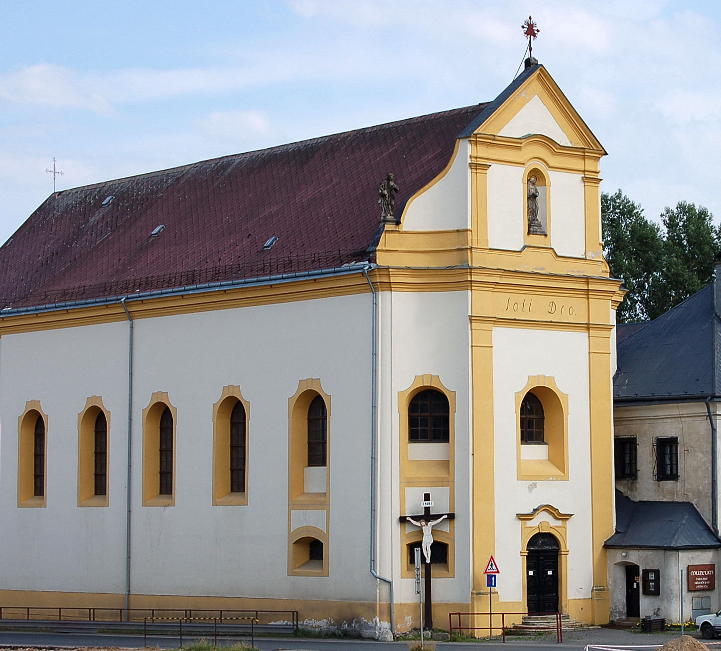 Kostel sv. Maří Magdaleny při bývalém františkánském klášteře v Tachově